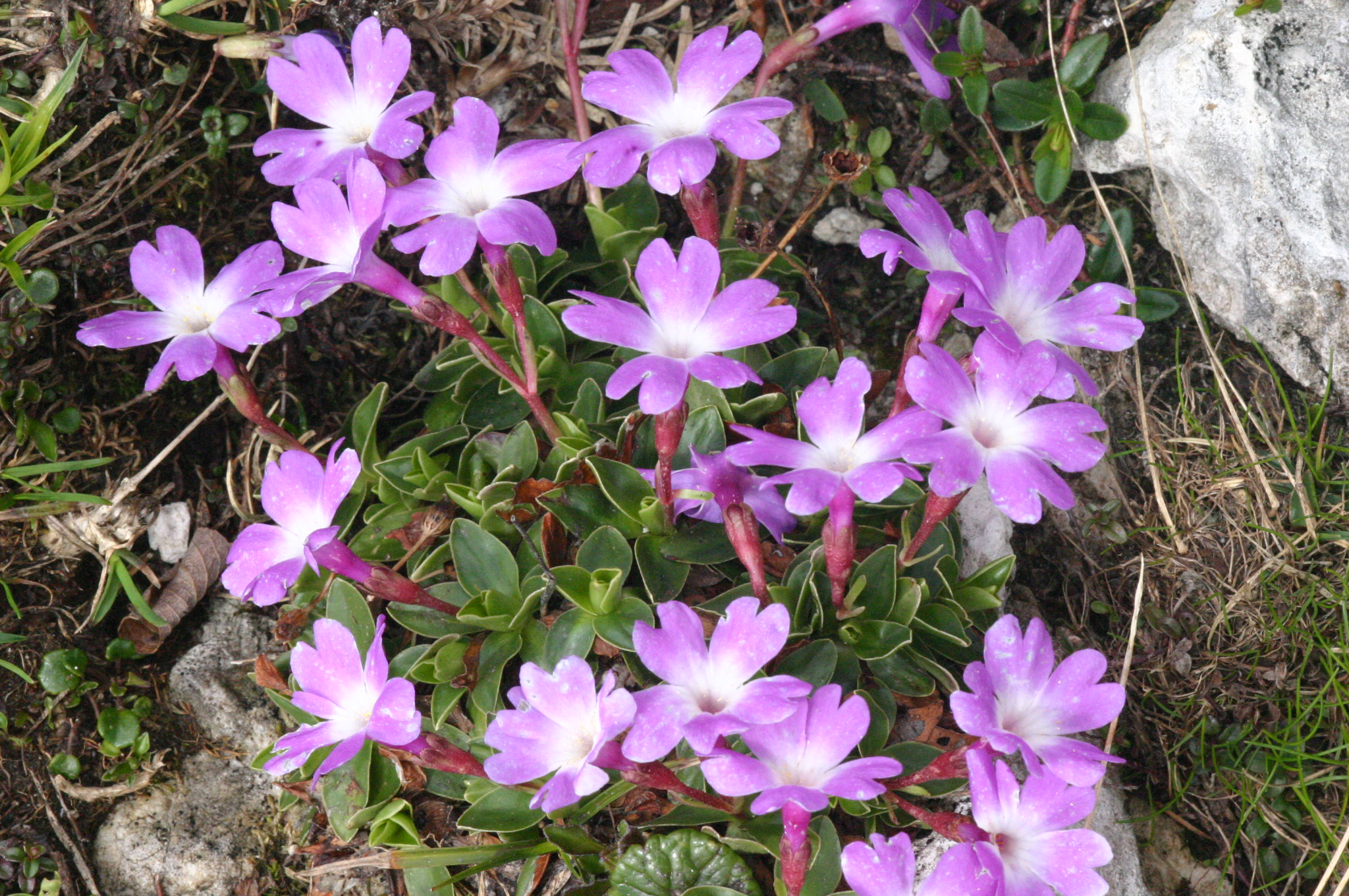 Primula wulfeniana (Wulfen-Primel) Aufnahmeort: Hochobir, Kärnten, Austria